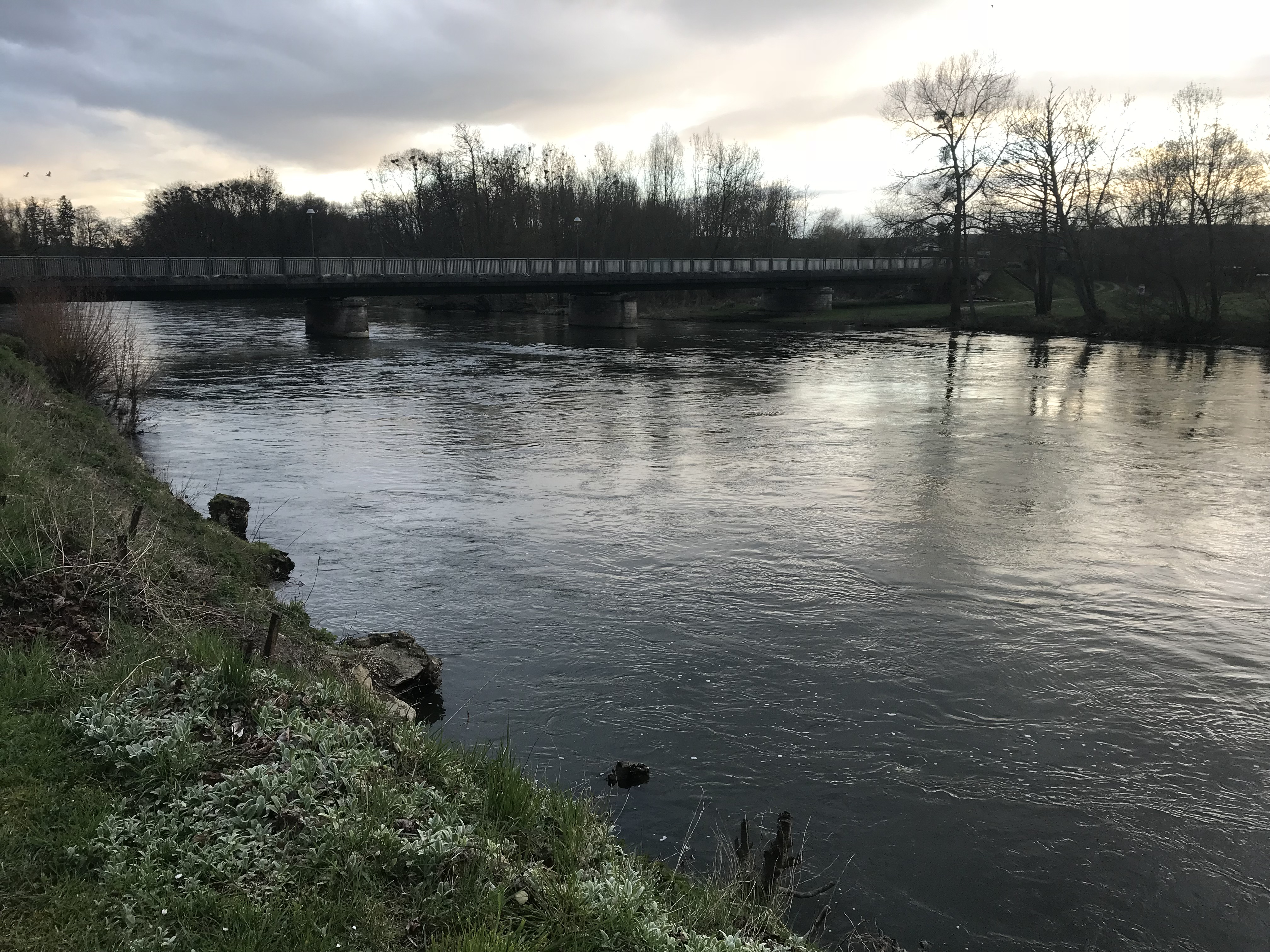 L'Yonne (rivière) à Vincelottes (Yonne, France).